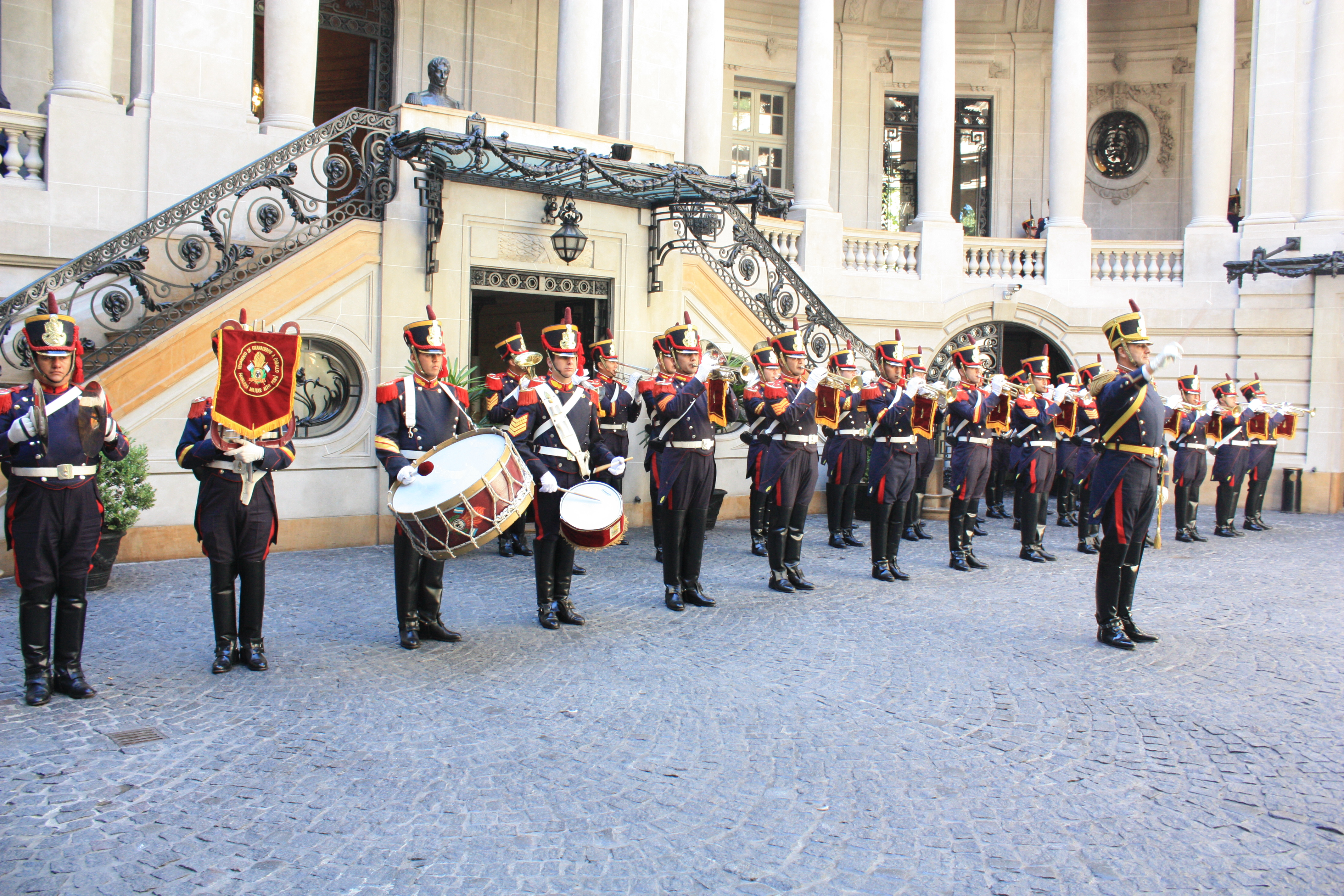 Palacio San Martín